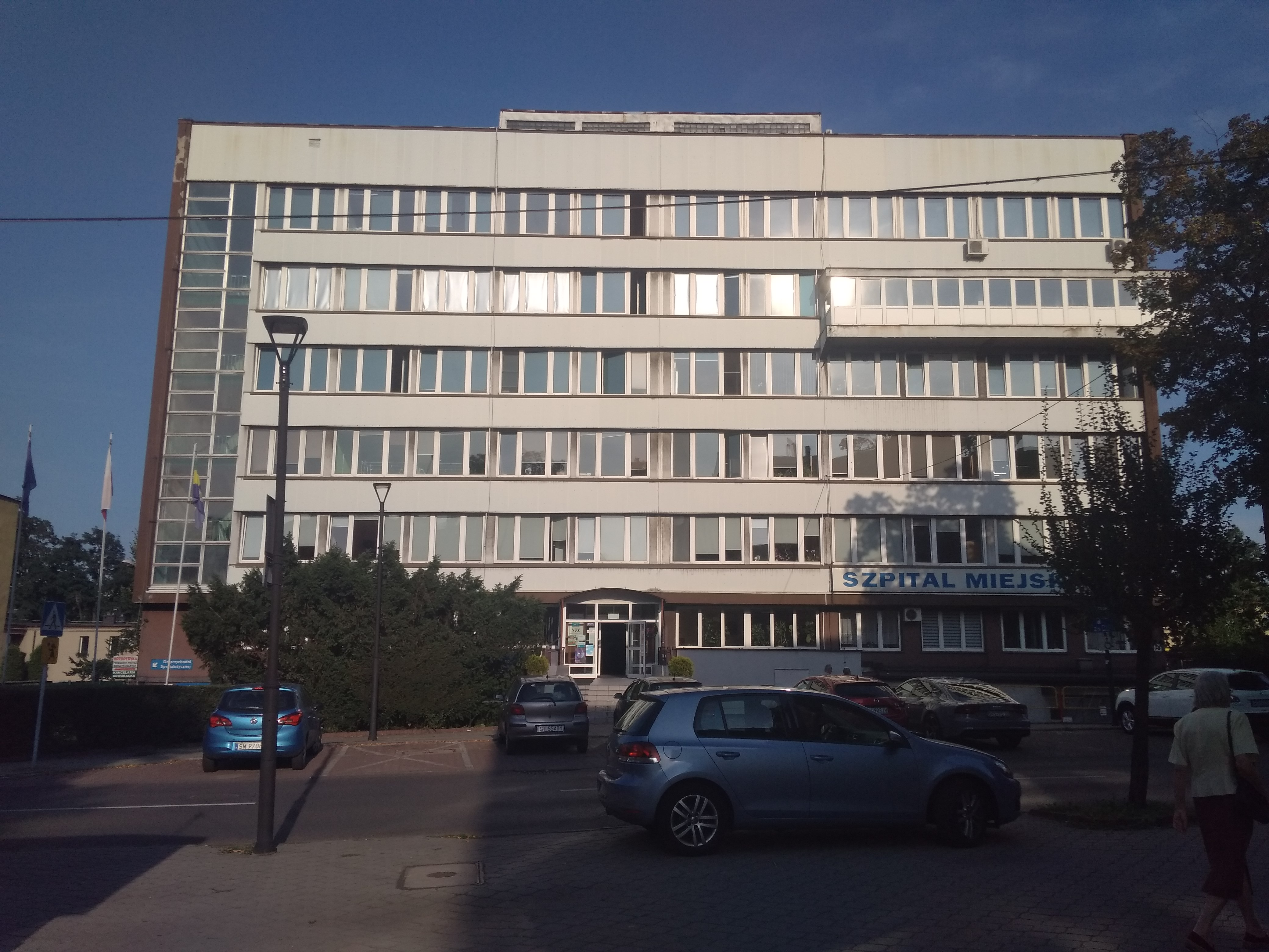 Szpital Miejski w Siemianowicach Śląskich